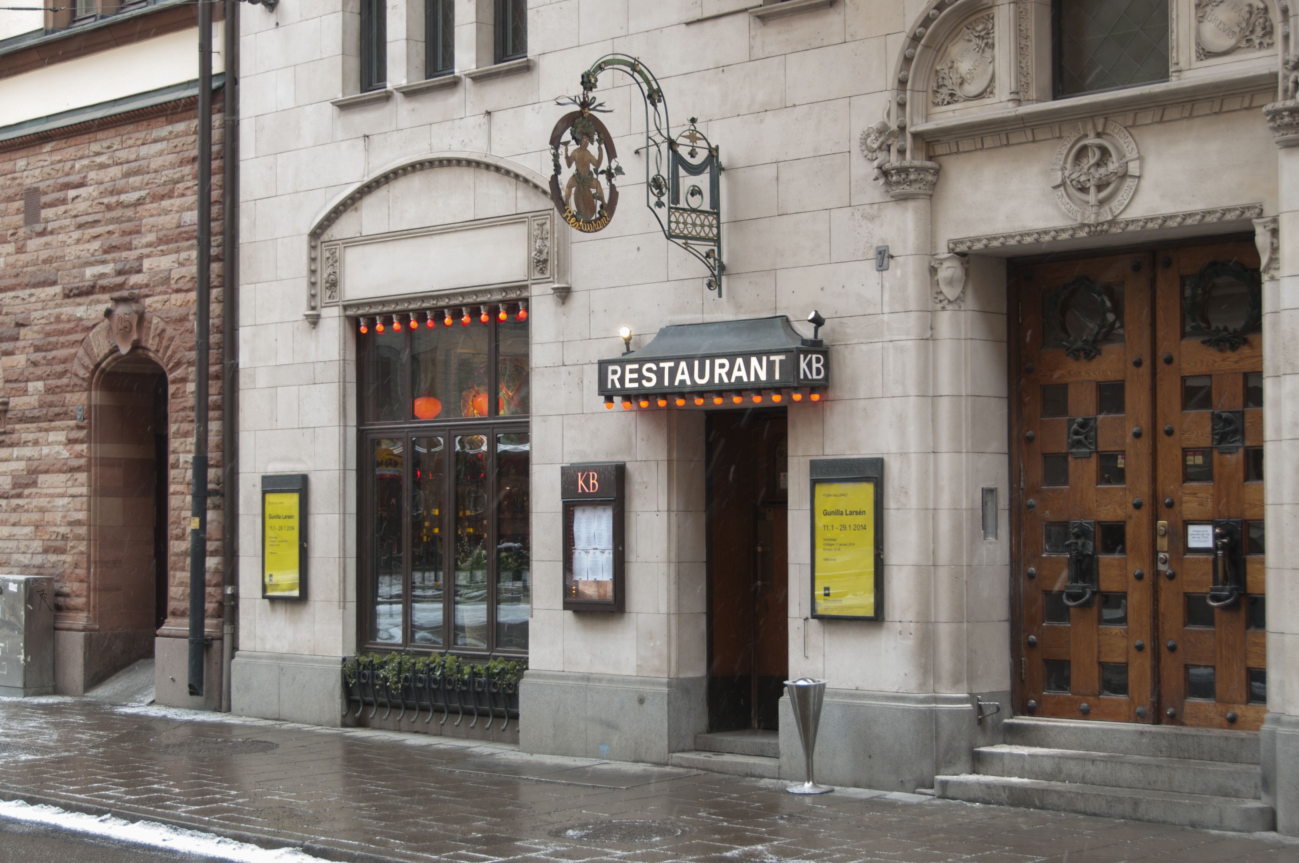 Konstnärshuset, kv. Skravelberget mindre 15, Smålandsgatan 7, Nybyggnadsår 1897 - 1898, Johan Sjöqvist (Byggmästare) Ludvig Peterson (Arkitekt) Styrelsen för Svenska Konstnärers Förening (Byggherre)